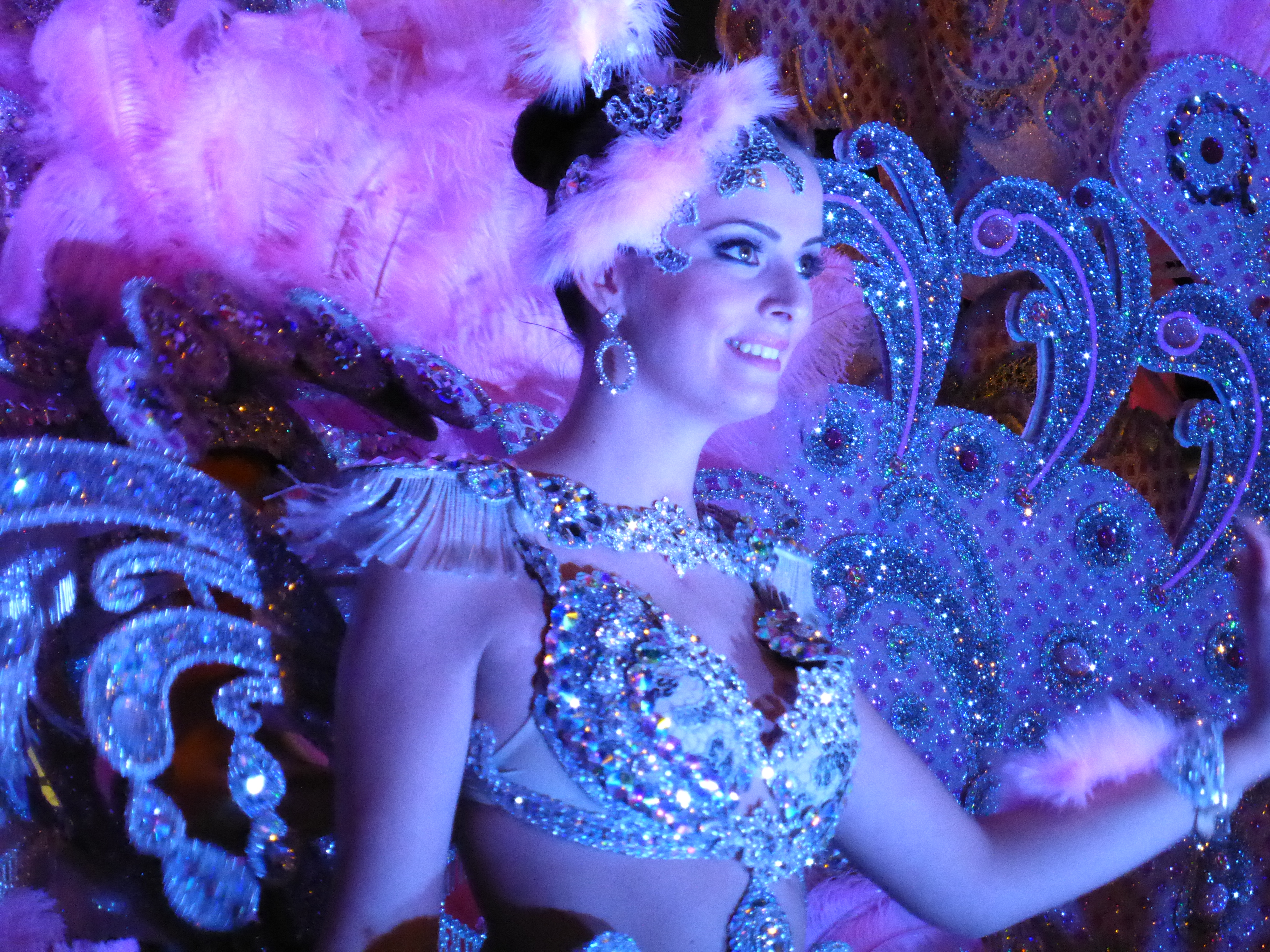 El viernes tiene lugar la Cabalgata anunciadora, que recorre muchas calles de Santa Cruz de Tenerife. En esta cabalgata desfilan todos los participantes organizados del carnaval. En las carrozas se muestran las diferentes damas que fueron aspirantes o candidatas a reina. En la fotografía vemos una de estas damas, del carnaval de 2016, que fue nombrada "3ª Dama de Honor".